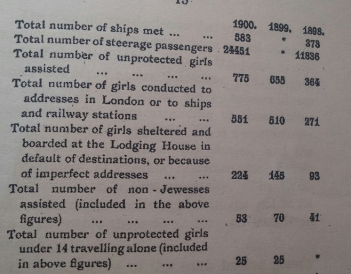 נתונים סטטיסטטיים מתוך אחד מדוחות הועדה